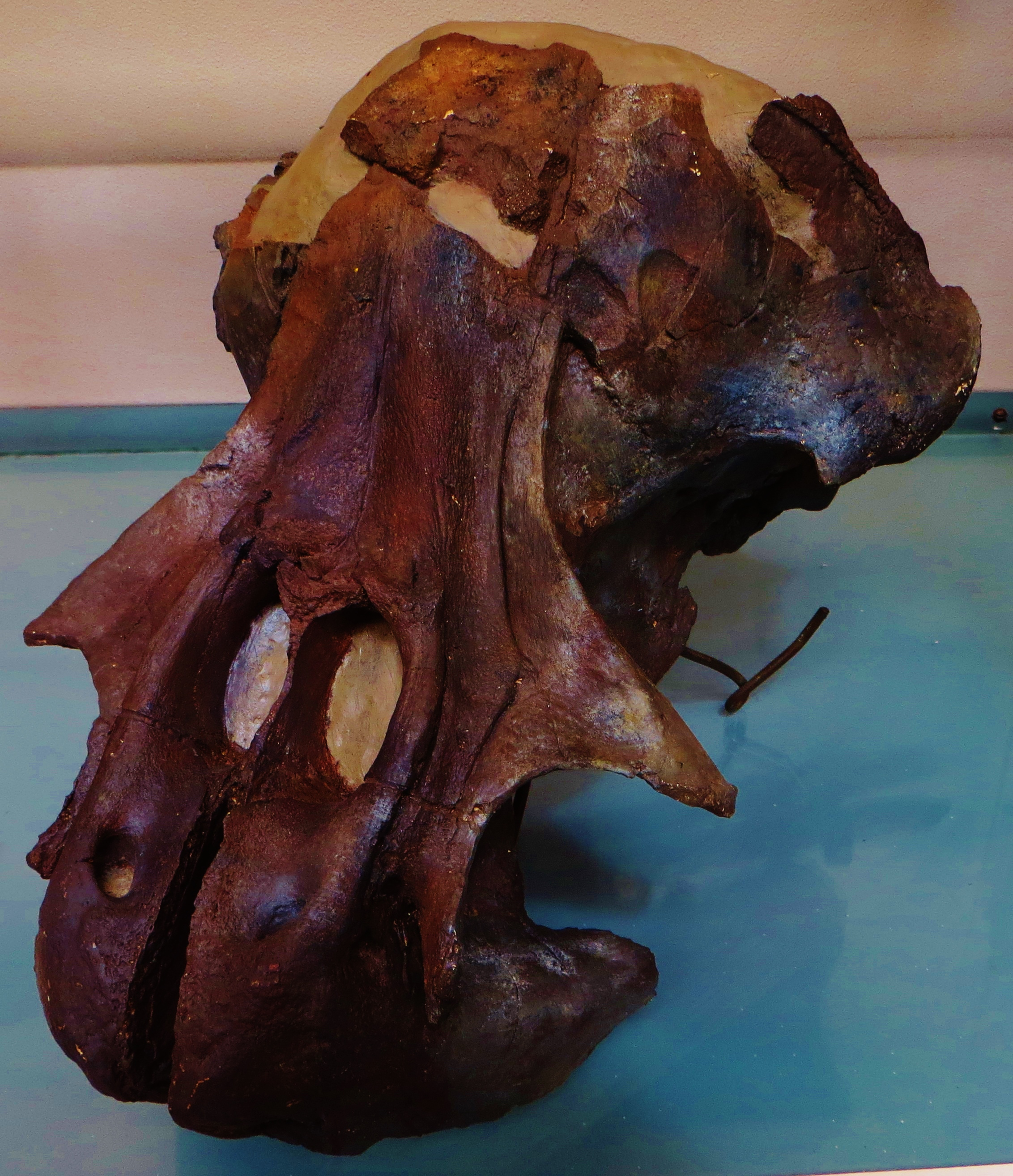 Fossil of Odobenocetops, an extinct mammal- Took the photo at Musee d'Histoire Naturelle, Paris